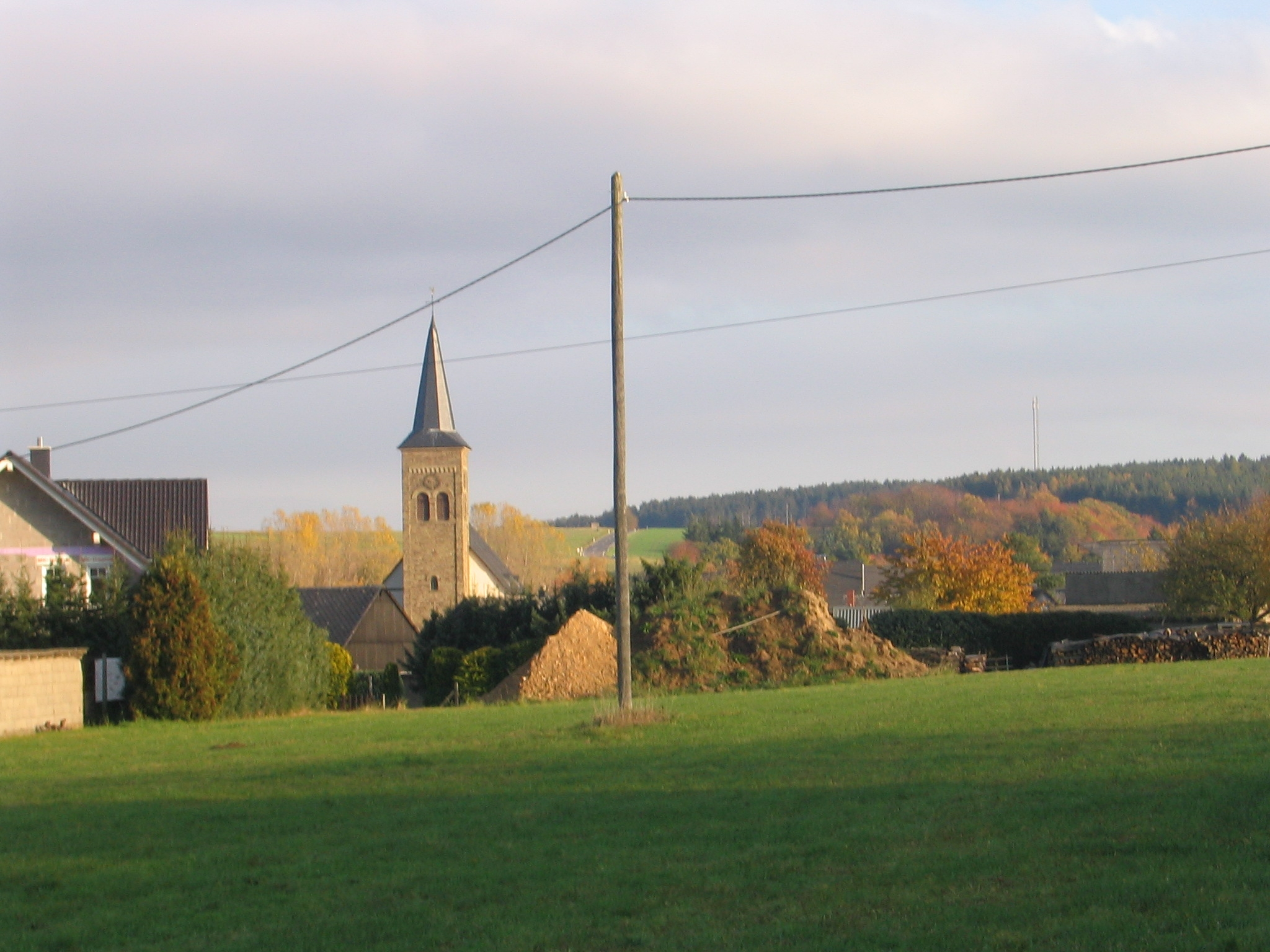 Bickenbach im Hunsrück